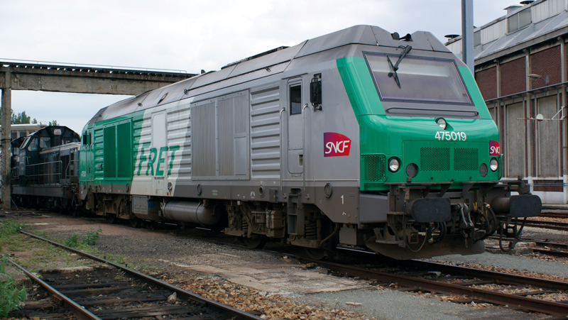 BB75019 au depôt de Longueau